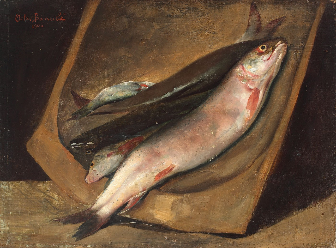 Păstrăvi, ulei pe pânză, 37 × 50 cm, semnat și datat stânga sus, cu roșu, "Octav Băncilă, 1906"